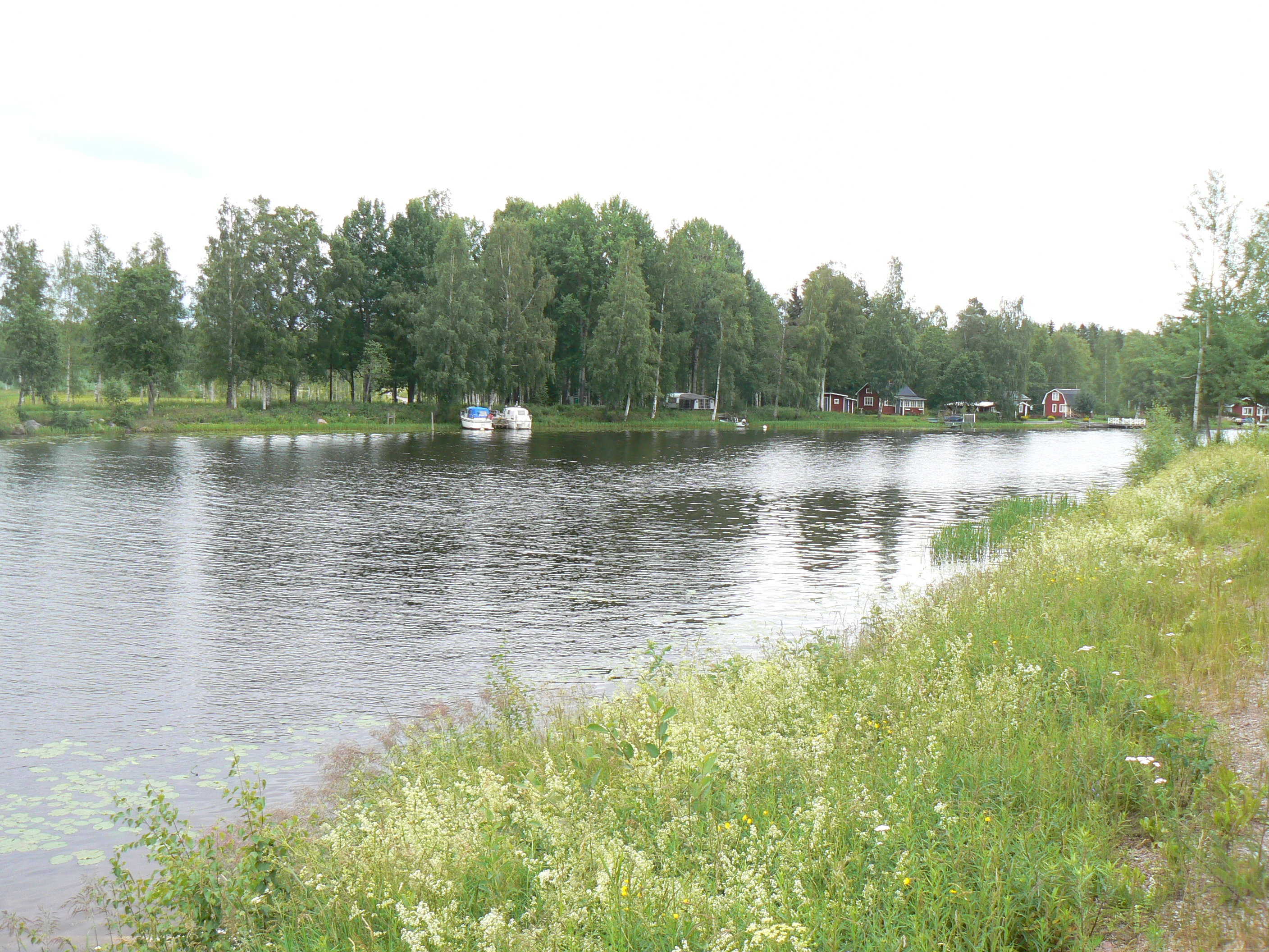 Lillälven, short river from Lake Runn to River Dalälven at Torsång in Sweden.